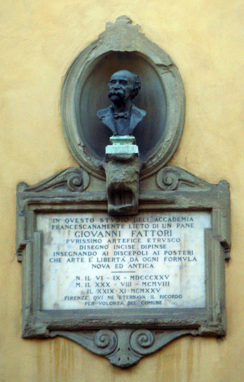 Giovanni Fattori, plate in Florence, Italy